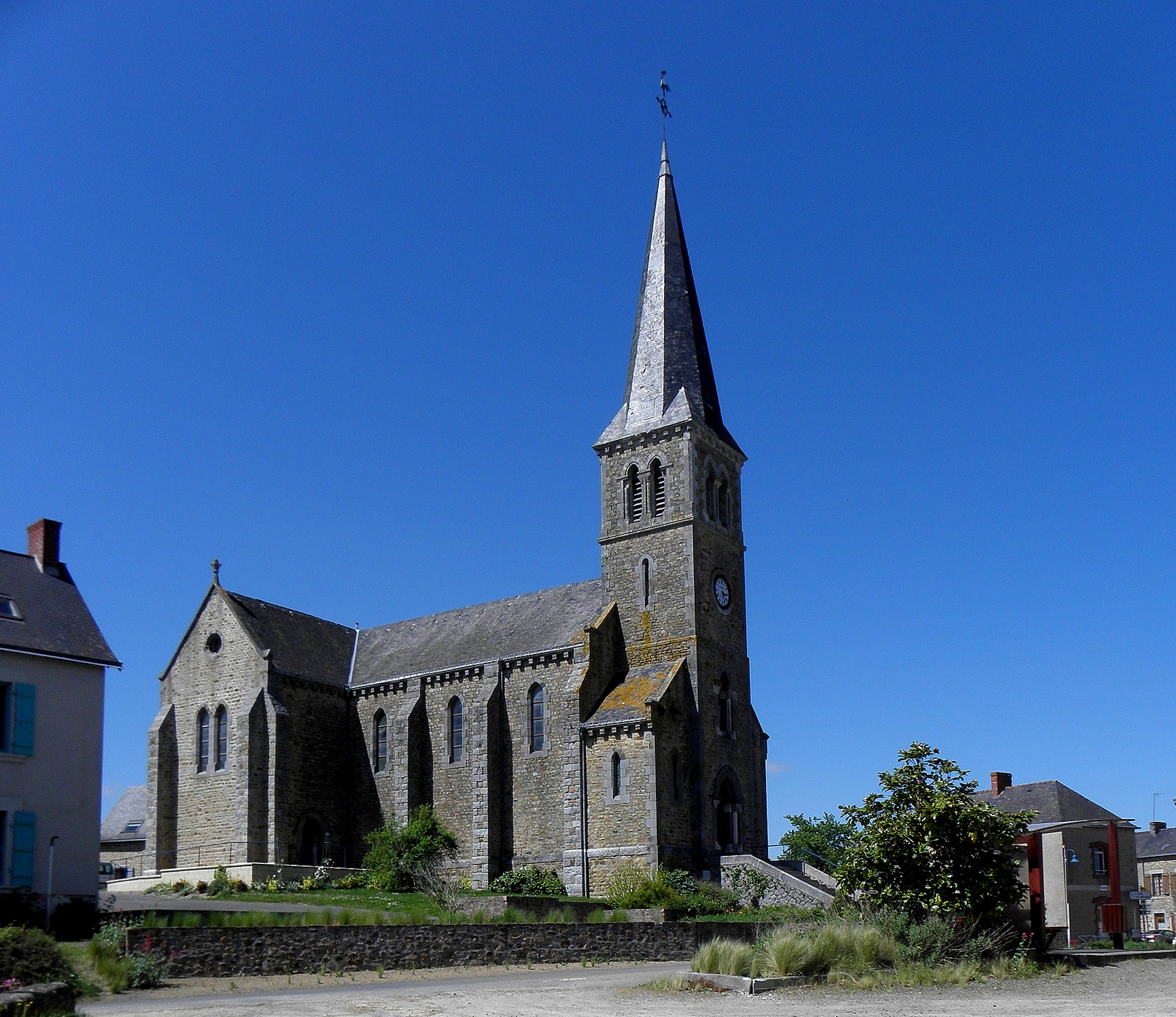 Église Saint-Martin de Montflours (53).